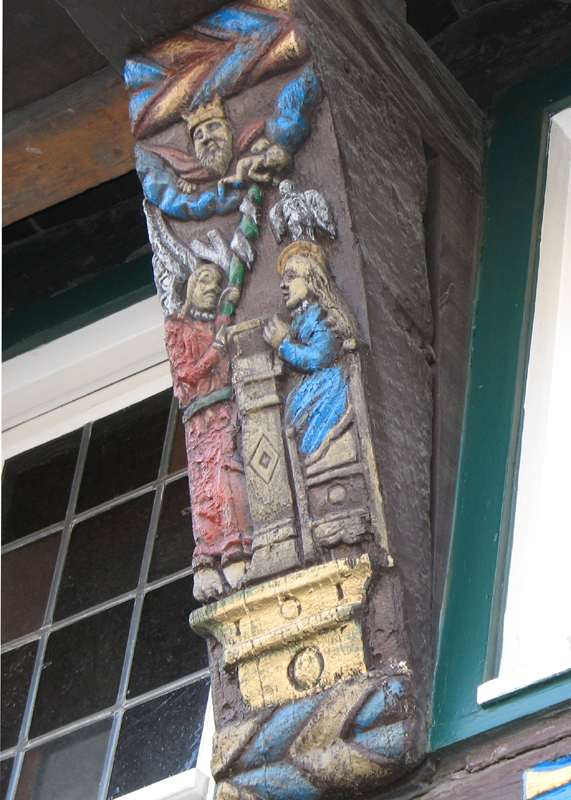 Knagge mit biblischem Motiv:Mariä Verkündigung